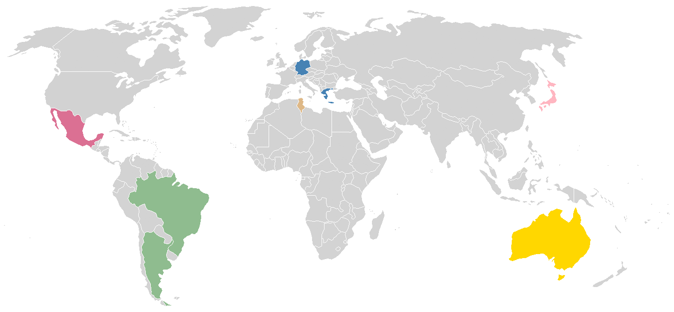 Teams of en:2005 FIFA Confederations Cup, Coupe des Confédérations 2005